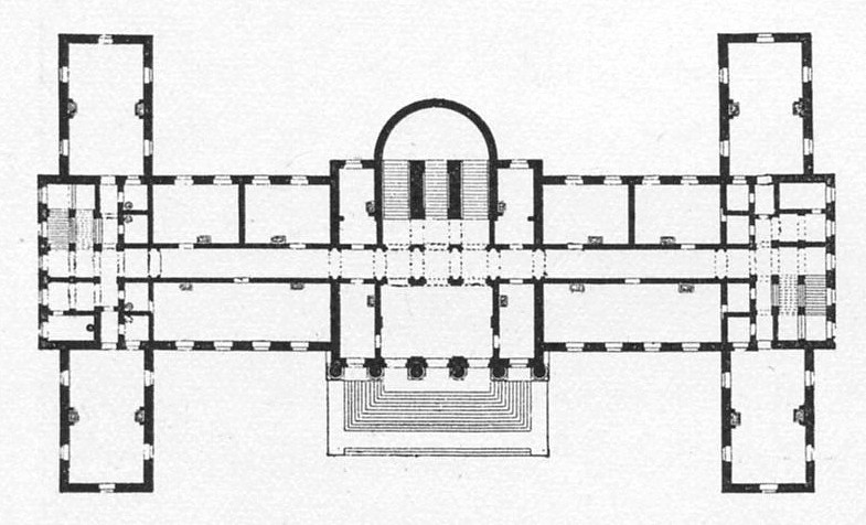 Garnisonssjukhuset (nuvarande Landstingshuset) planritning, bottenvåning